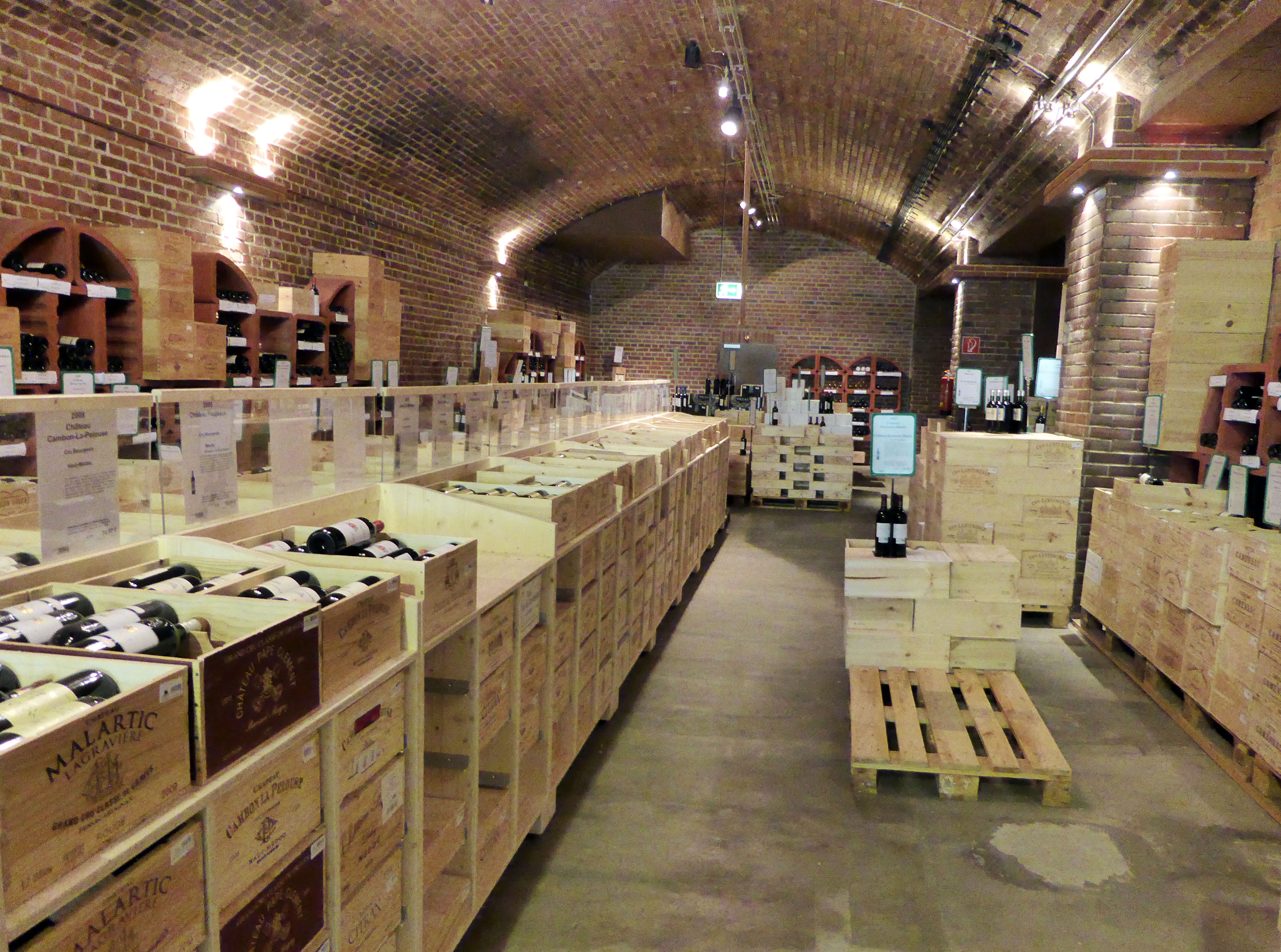 Kölner Weinkeller